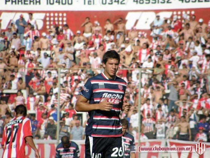 Diego Barisone en el Estadio 15 de Abril - club Atlético Unión de Santa Fe